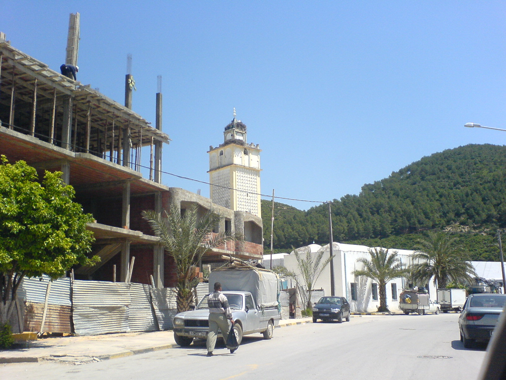 Grande mosquée de Nefza (Tunisie)